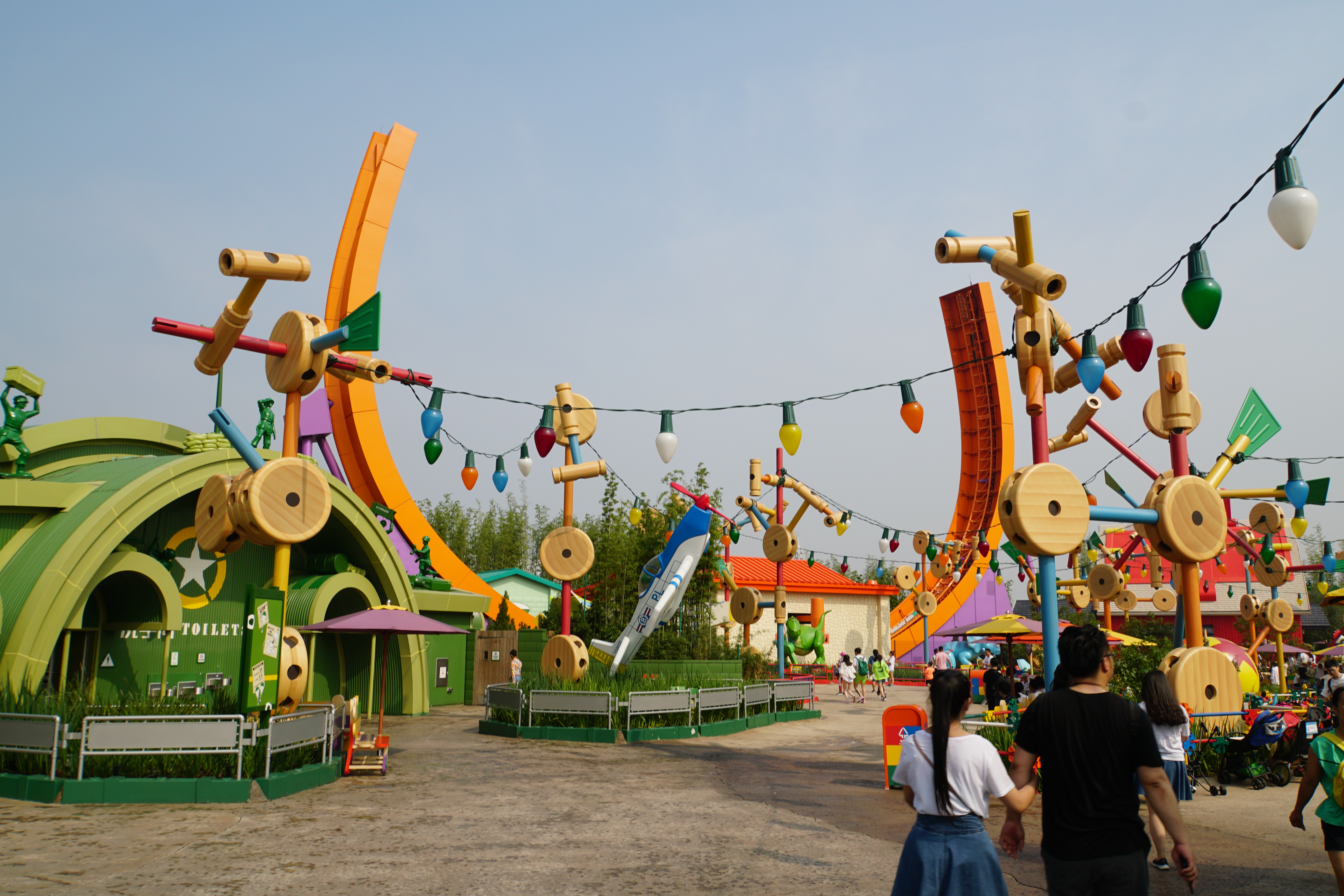 上海迪士尼乐园抱抱龙冲天赛车